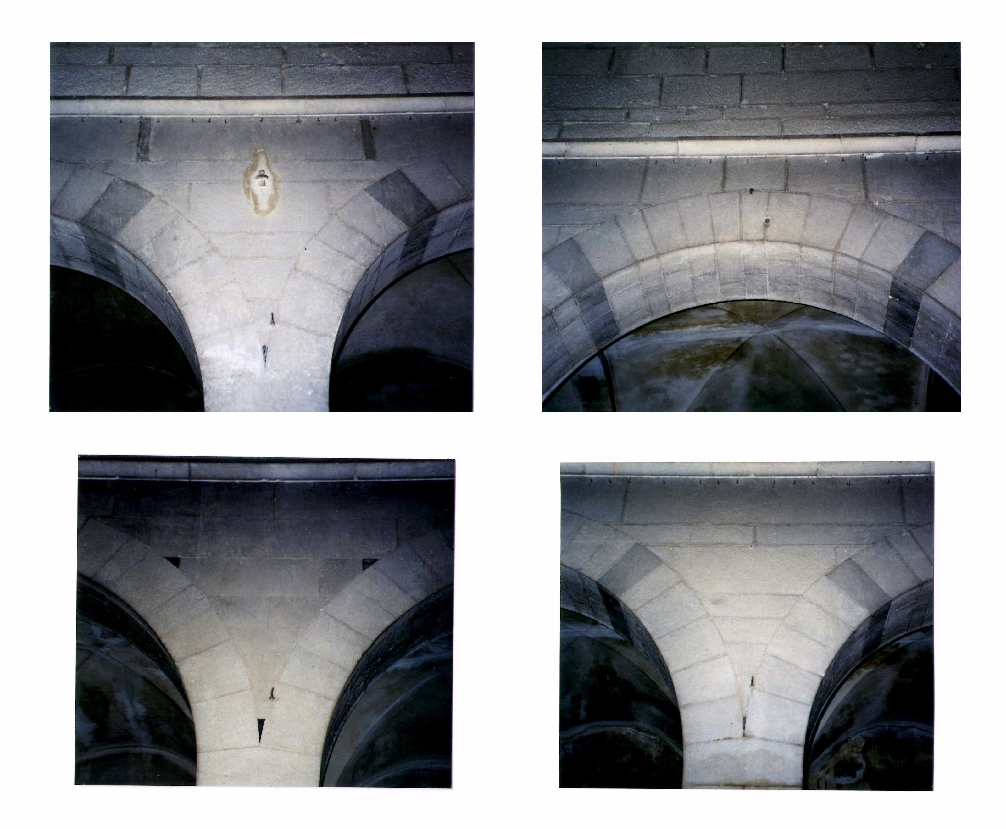 Nelle arcate pertinenti alla prima fase costruttiva le pietre si dispongono simmetricamente rispetto all'asse delle colonne e degli archi, facendo coincidere ordine statico e geometrico, con un effetto decorativo che richiama l'opus sectile dell'antichità. Questo tipo di disposizione si riscontra in architetture tardo antiche (ad esempio nelle arcate del peristilio del Palazzo di Diocleziano a Spalato o in quelle interne della Cupola della Roccia a Gerusalemme), ma non nella locale architettura romanica. Un ordinamento simile si ritrova però a Empoli, nelle arcate di facciata della Collegiata di Sant'Andrea, quindi nell'ambito del "Romanico fiorentino" le cui caratteristiche incrostazioni marmoree si rifanno ad esempi paleocristiani.